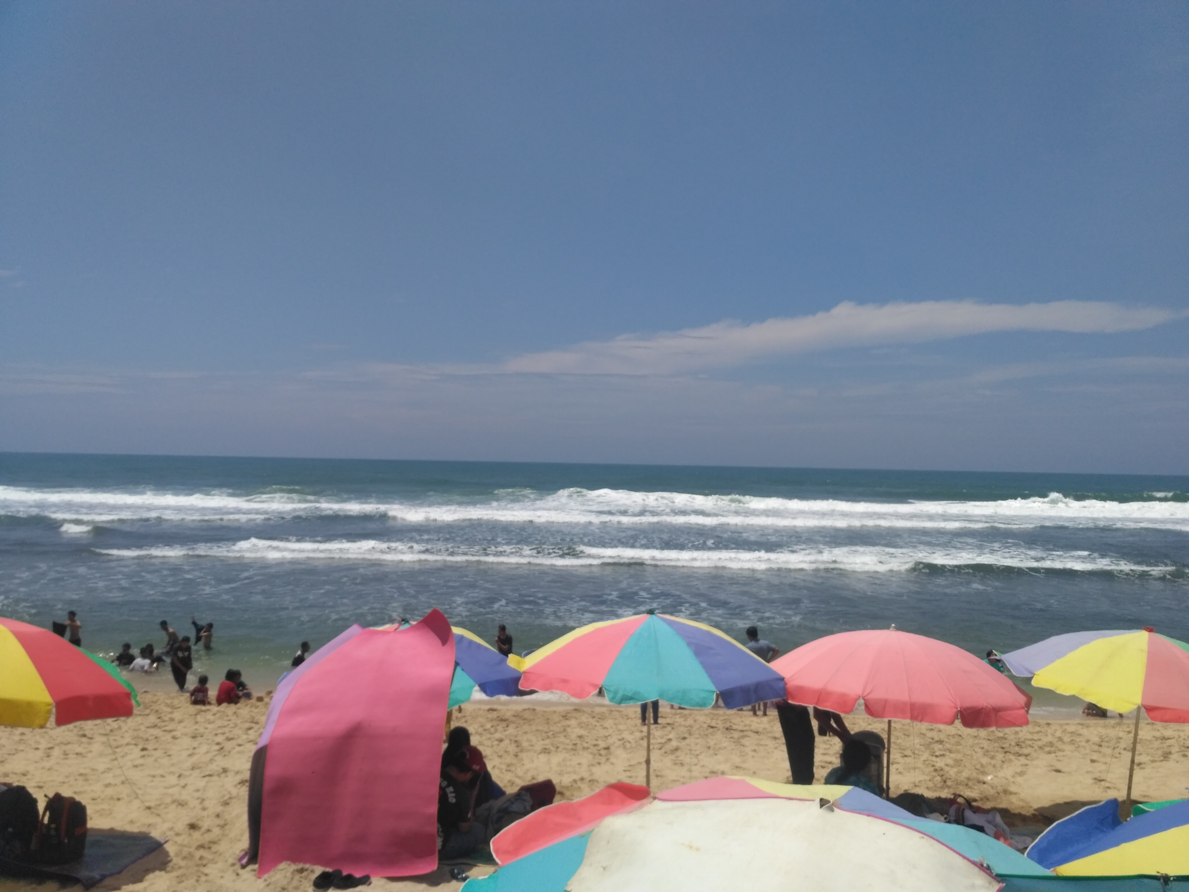 Basa Jawa: Salah sawijining papan pariwisata ingkang misuwur ana ing Gunung Kidul